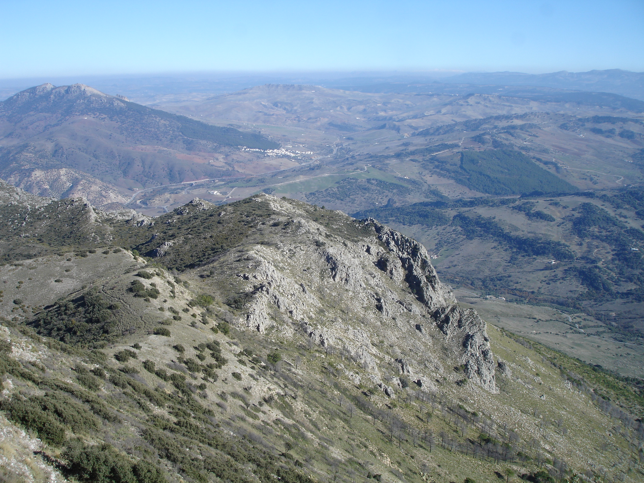 Algodonales desde el Cerro Coros